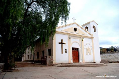 Capilla nuestra Señora del Rosario